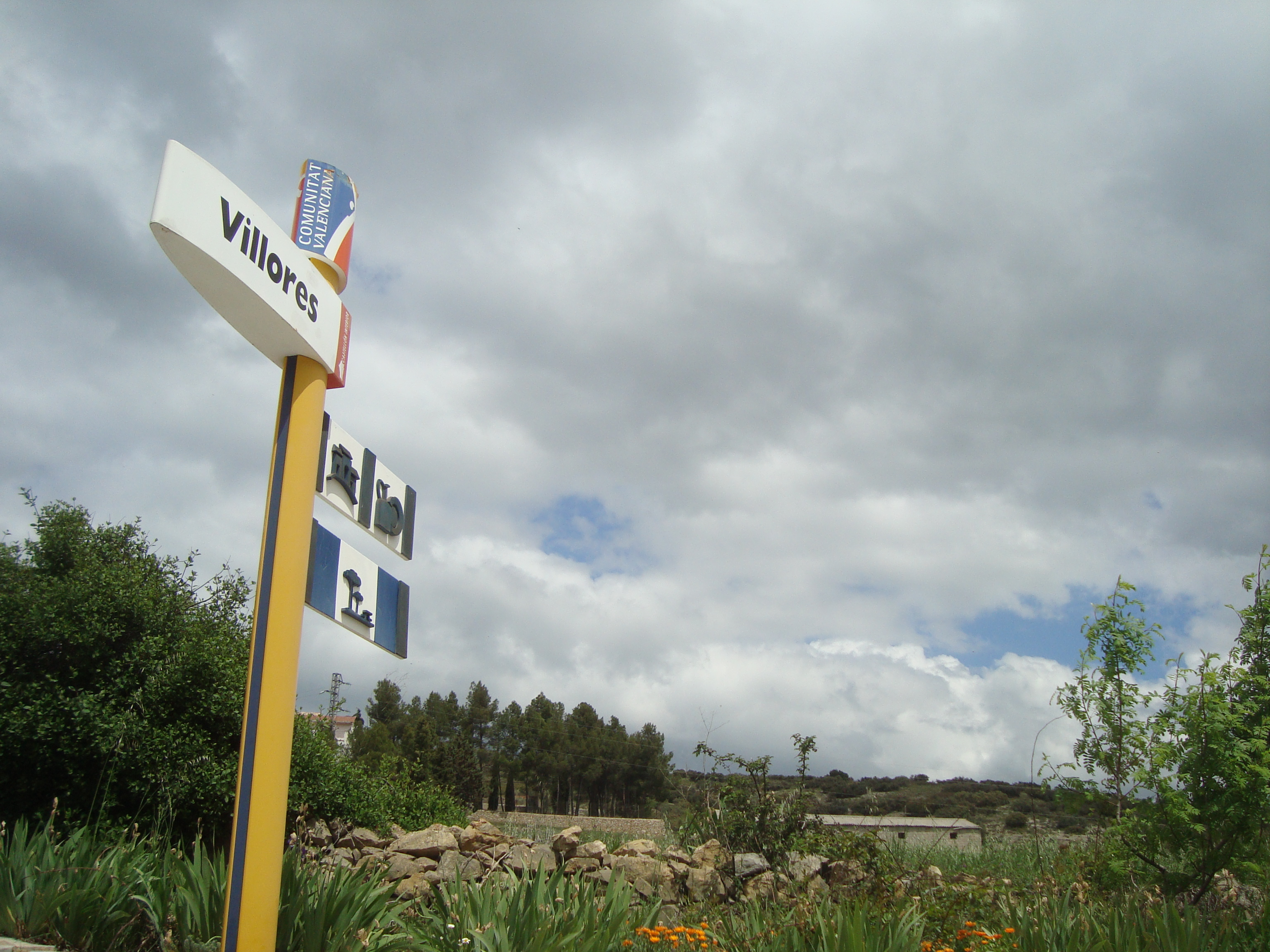 Villores (Castellón)